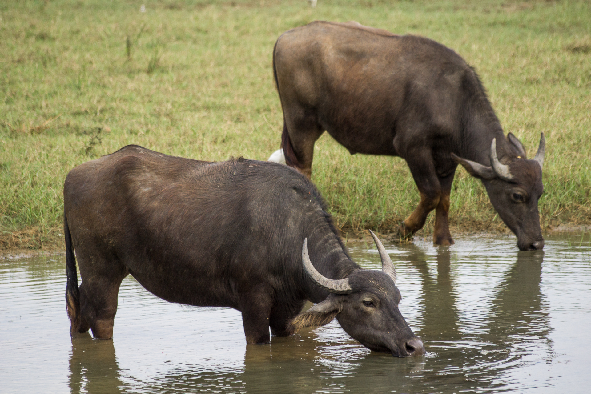 auf Sri Lanka